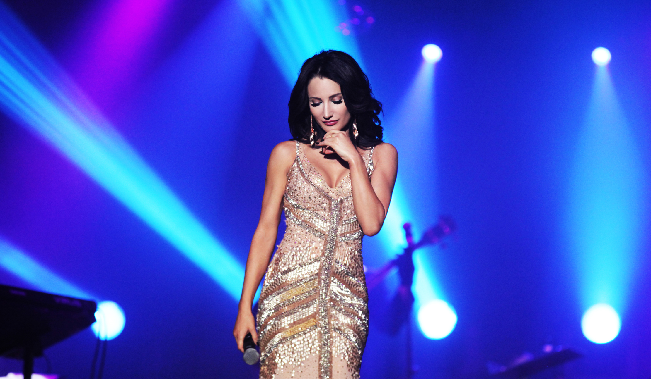 Justyna Steczkowska